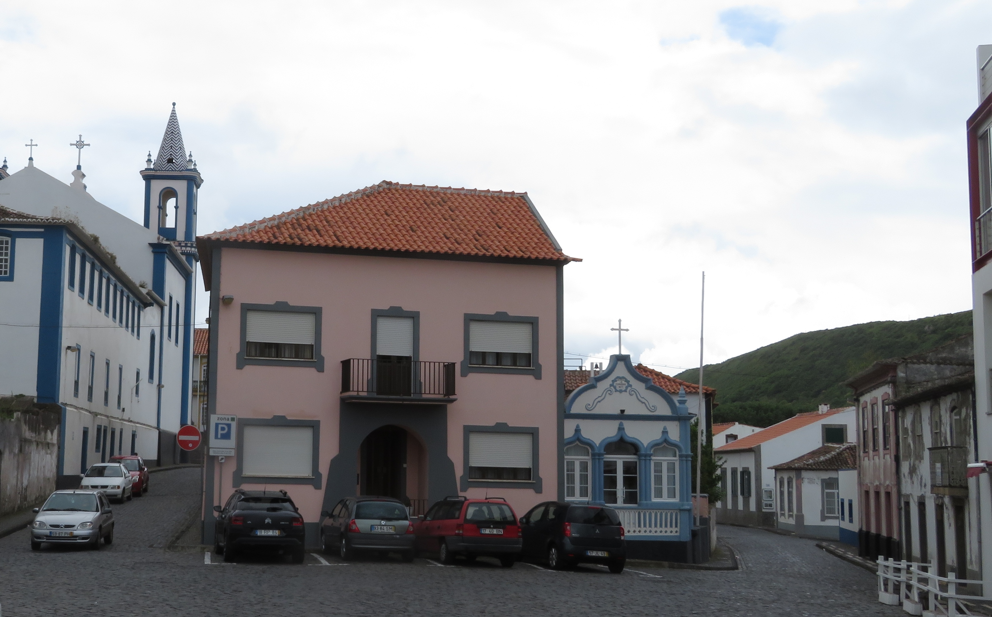 Largo José S. Ribeiro mit Kapelle "Império dos Marítimos", Praia da Vitória, Insel Terceira, Azoren, Portugal